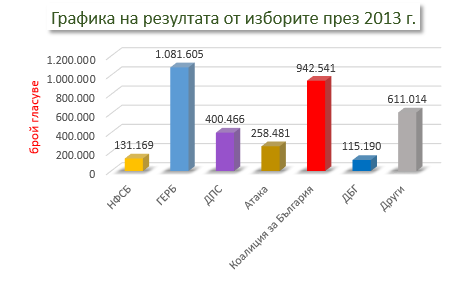 Парламентарни избори в България през 2013 г.: графика на резулта от гласувете